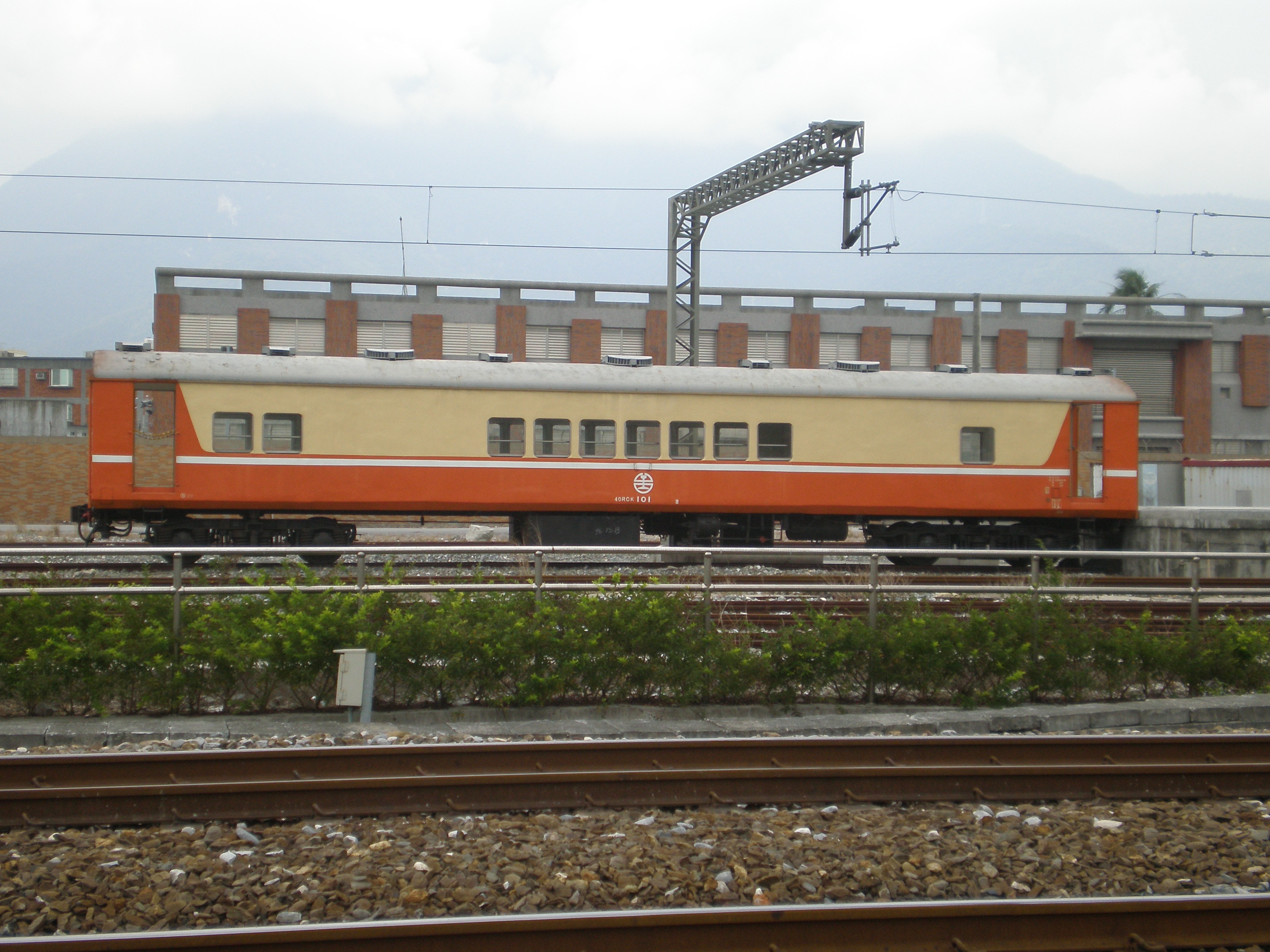 臺灣鐵路管理局汽車載運車40RCK101，攝於花蓮機務段。